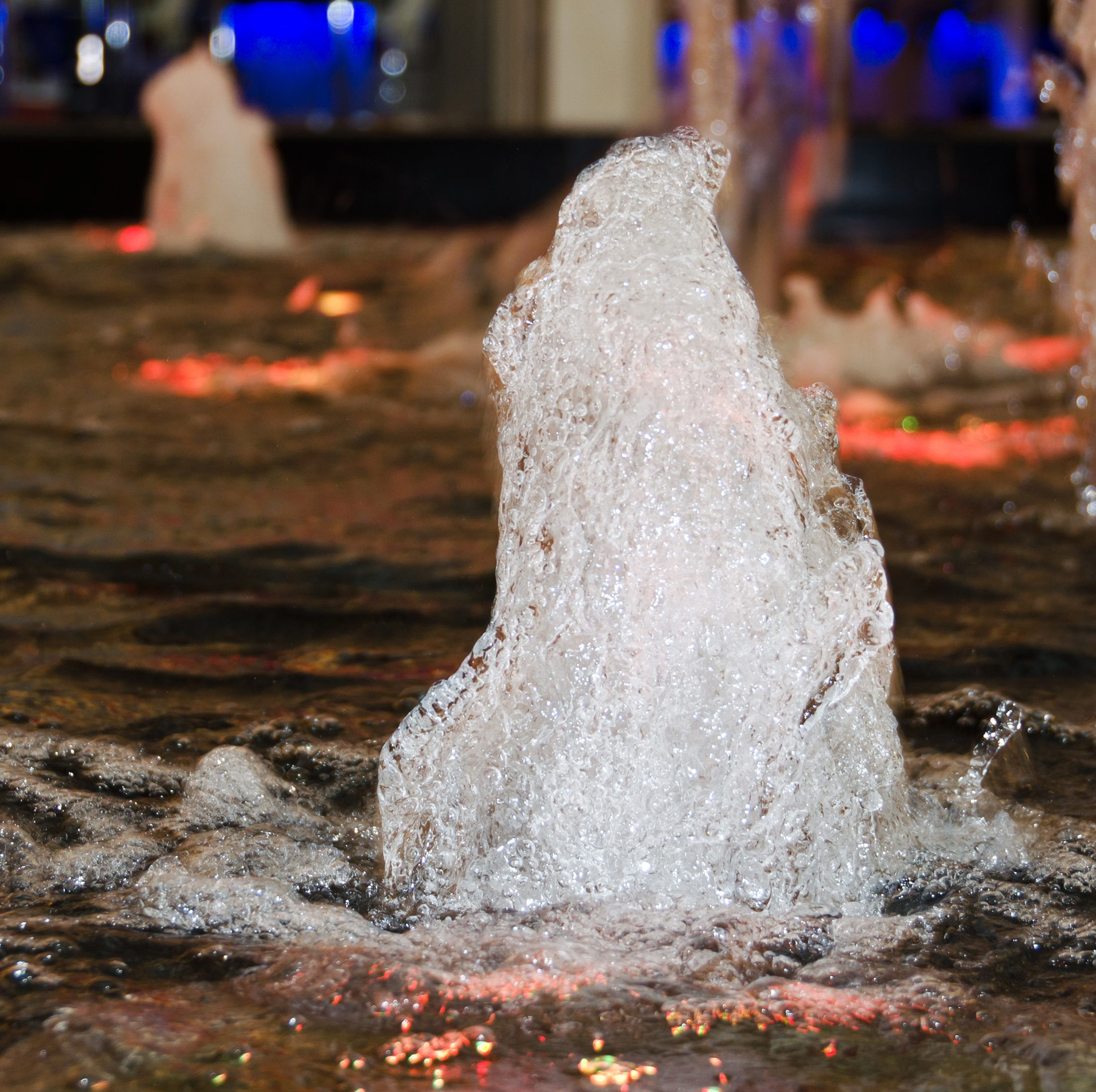 Woda w fontannie w centrum handlowym Magnolia Park we Wrocławiu